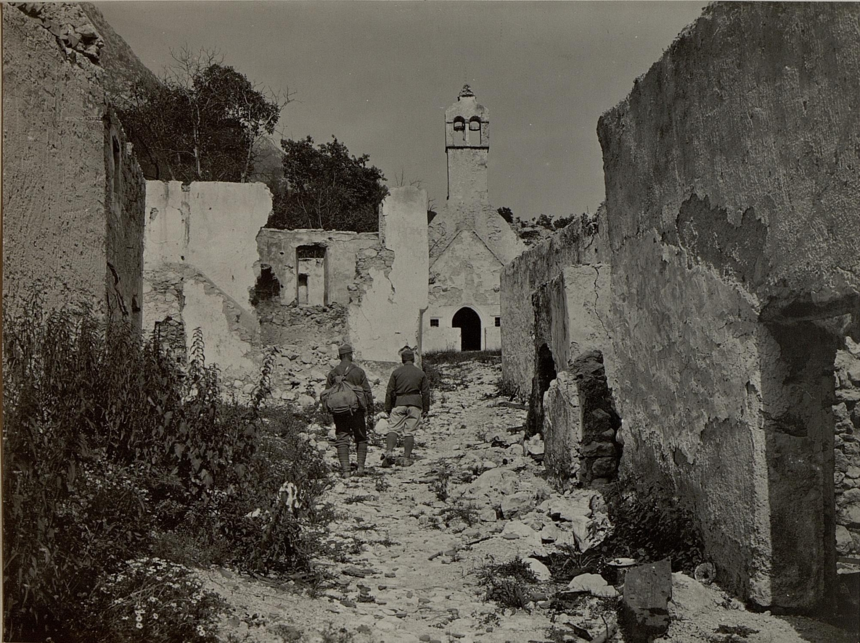 Kirche in Kal.